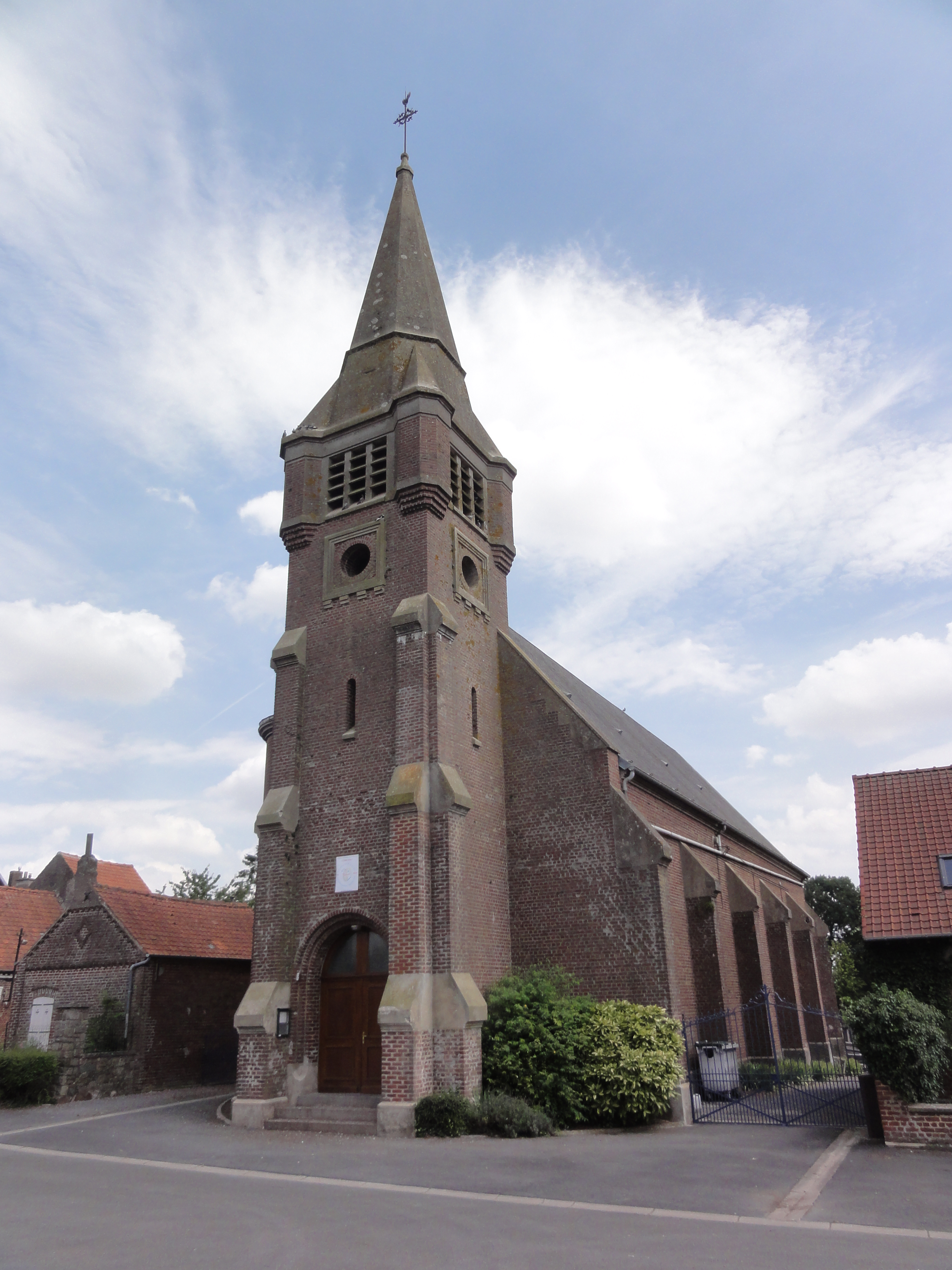 Aubencheul-aux-Bois (Aisne) église